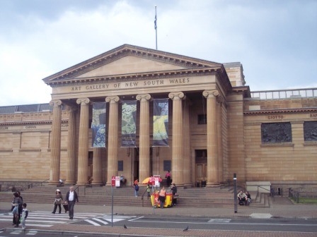 뉴사우스웨일스 주 아트 갤러리.